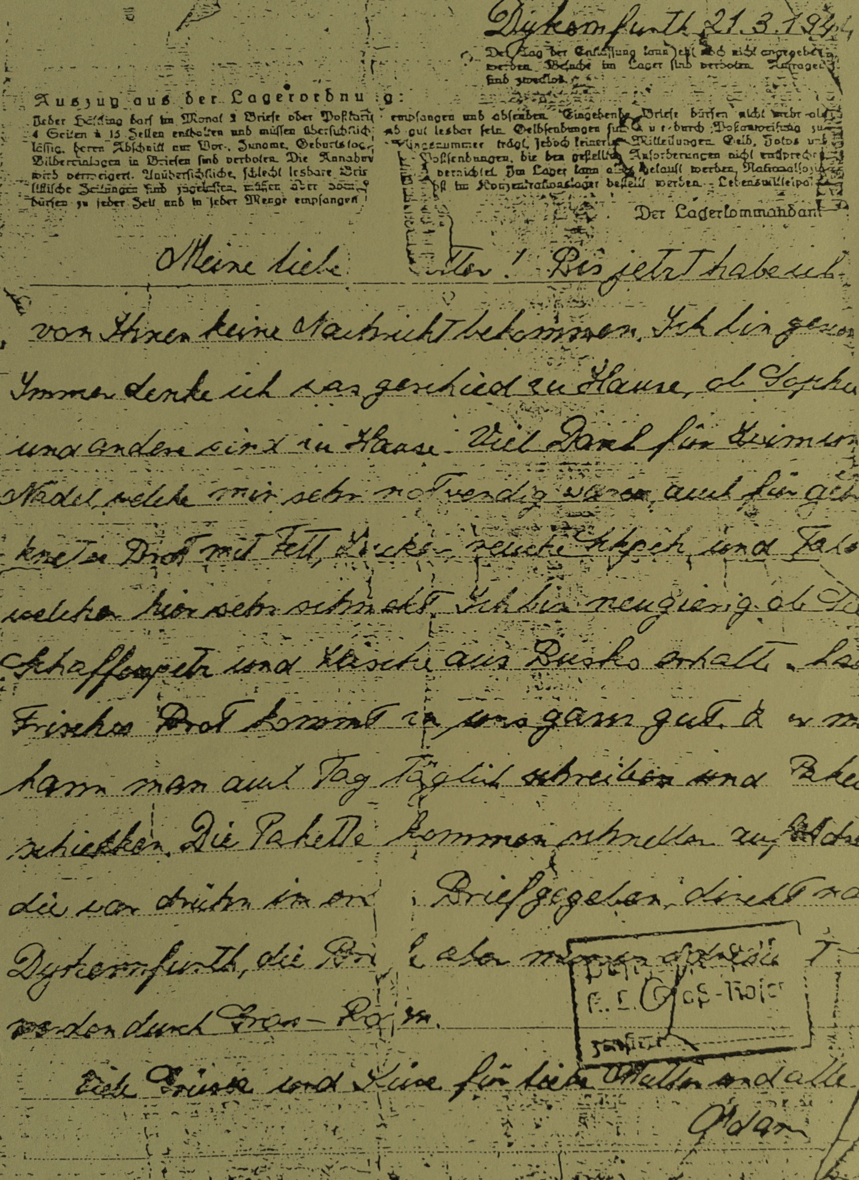 List Adama Dulęby z 21 marca 1944 roku z obozu Gross Rosen.